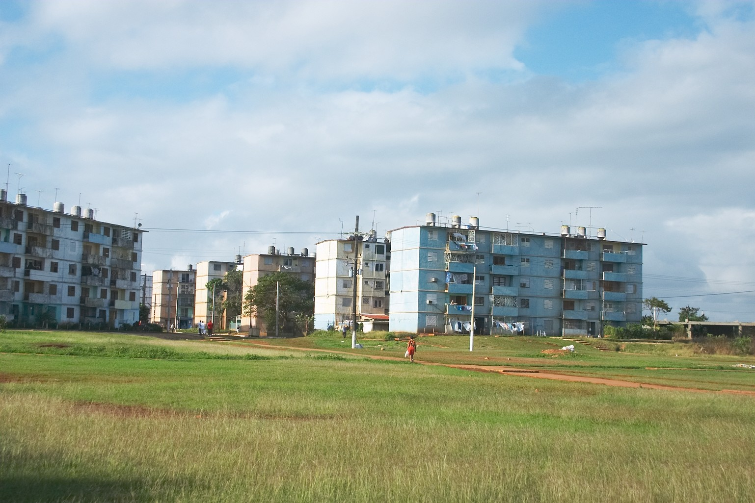 Cardenas city, Cuba